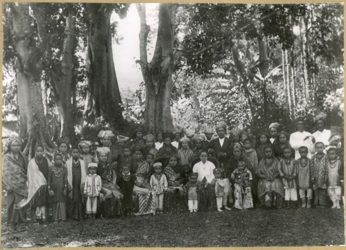 Negatief. Portret van het districtshoofd van Soengei Poear, Soetan Suleiman, met zijn familie